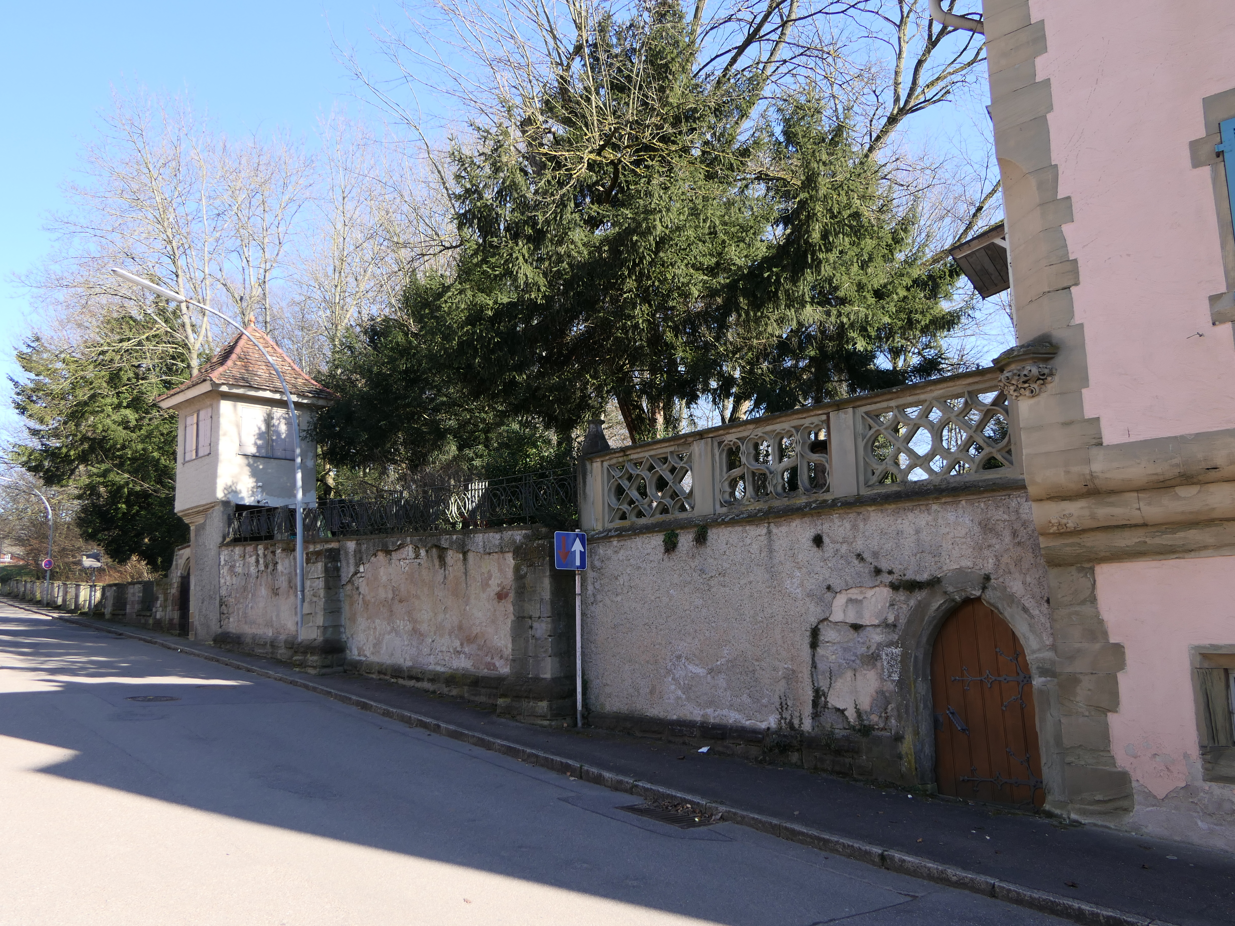 Das Schloss Grossheppach im gleichnamigen Teilort der Stadt Weinstadt im Rems-Murr-Kreis. Teile der Wehrmauer.